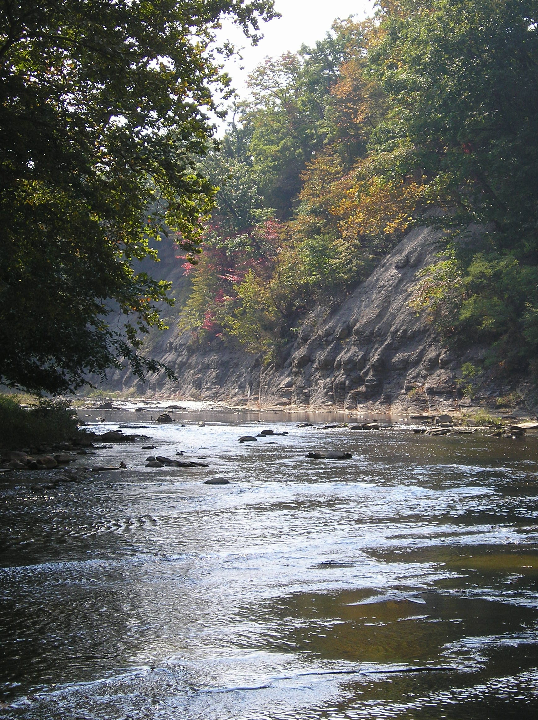 J Astolfi, personal picture